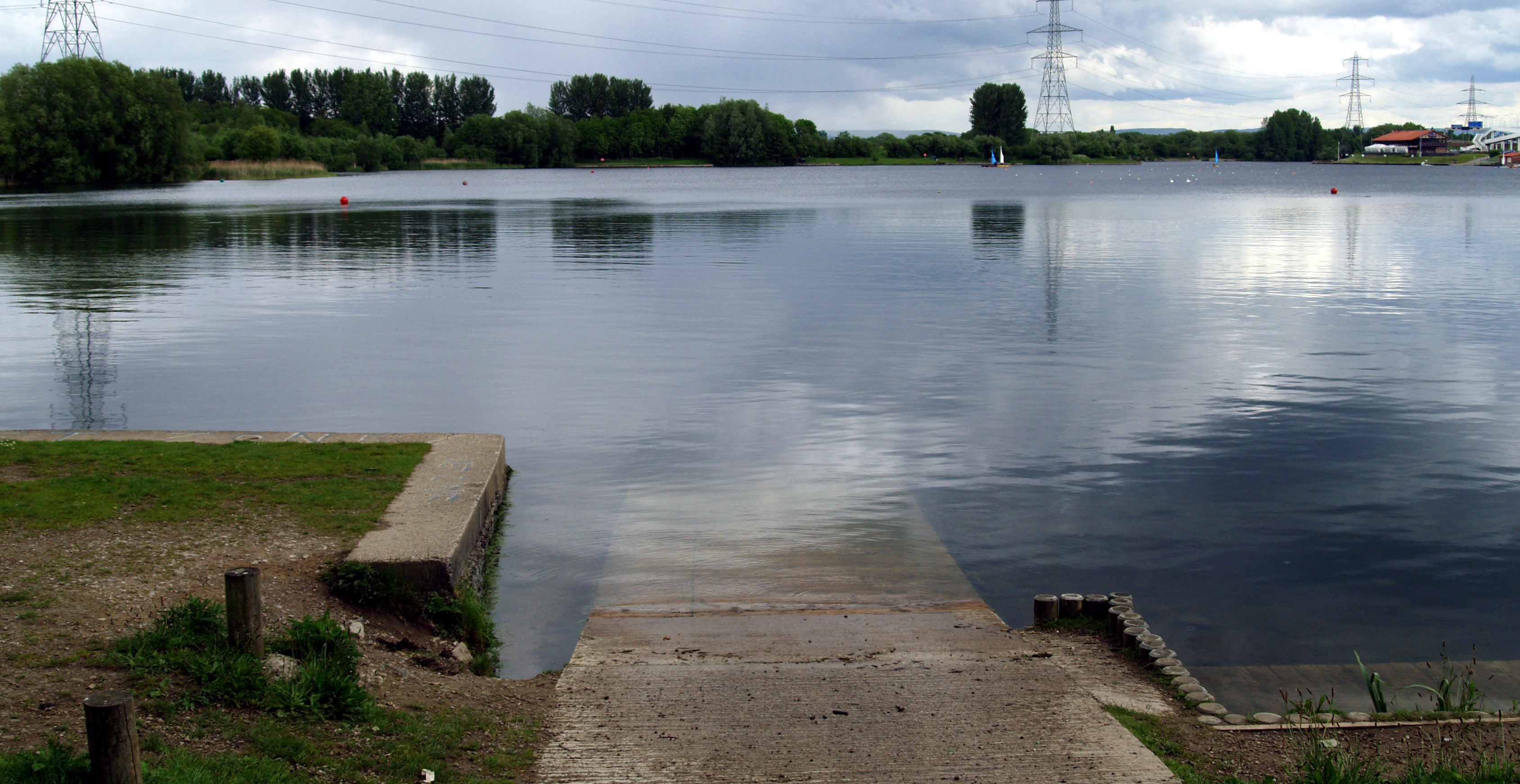 Sale Water Park